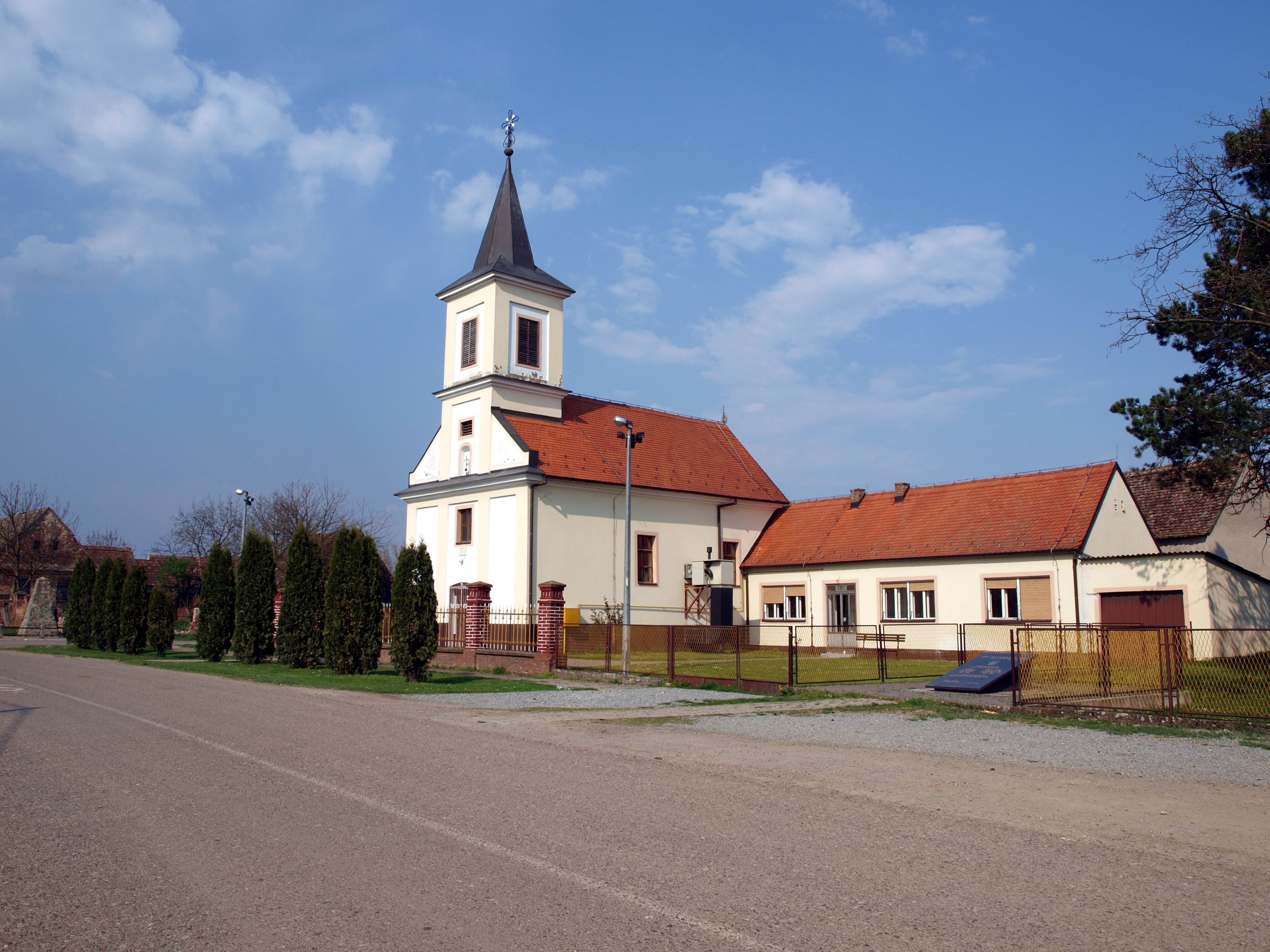 Crkva u selu Zadubravlje, Brodsko-posavska županija.